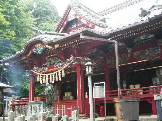 Tokaosan-yakuoin Tokyo